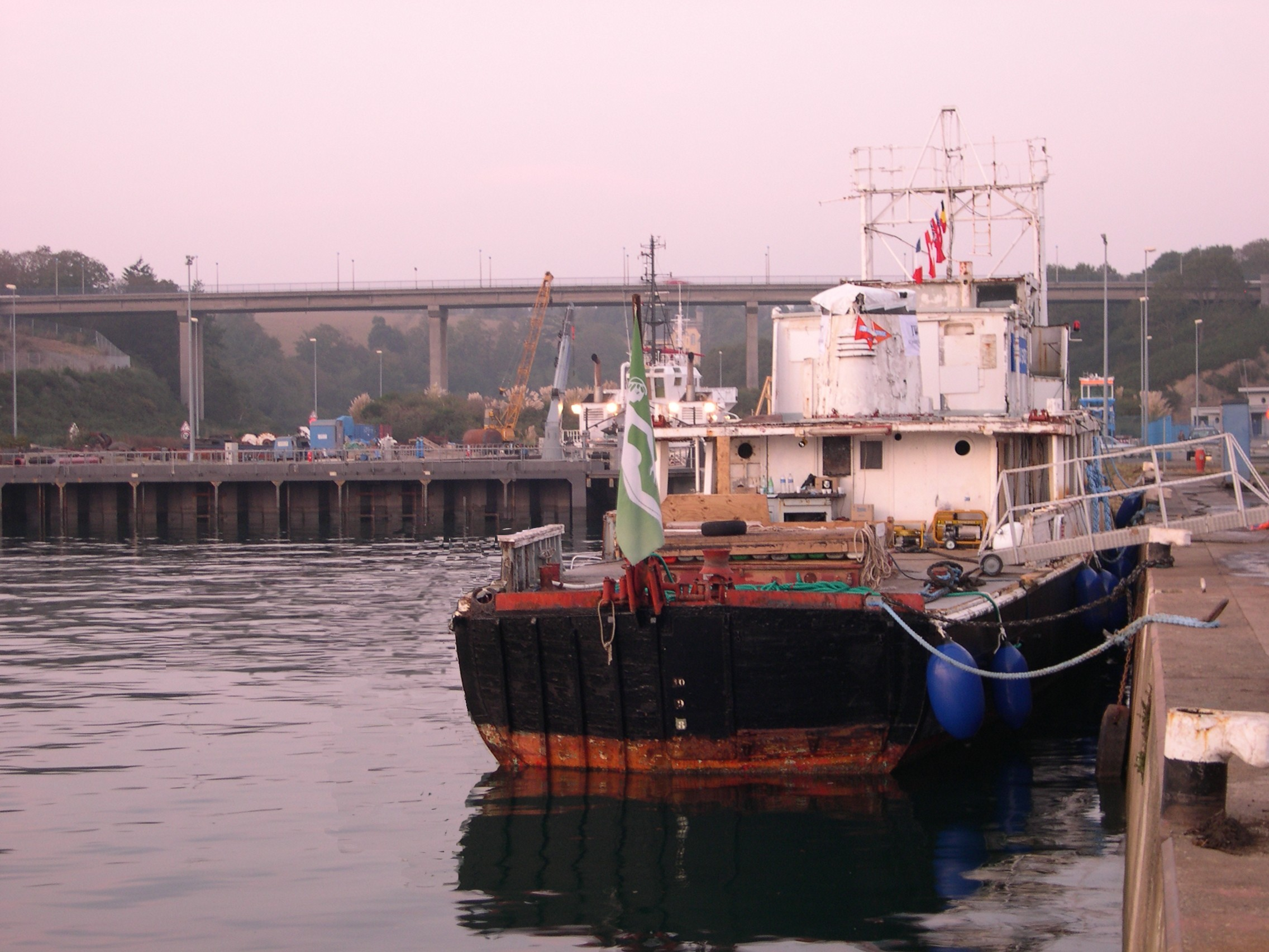 Calypso quai est